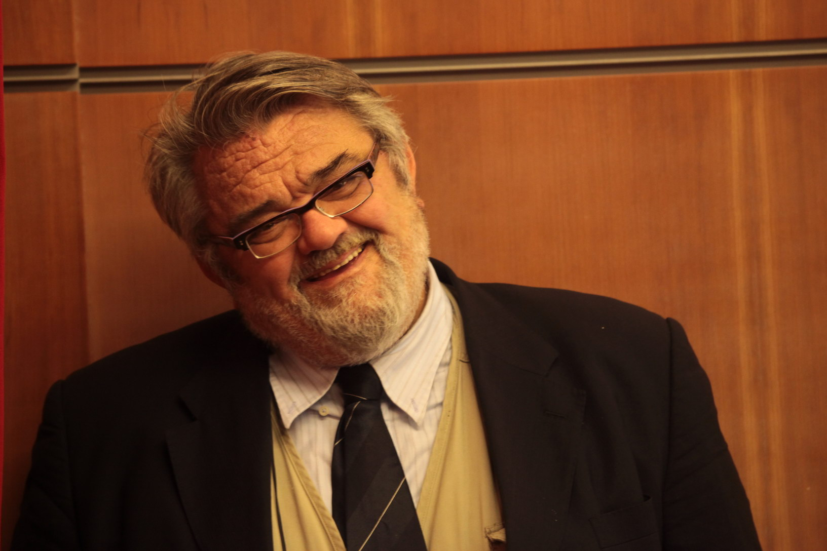 Walter Ganapini